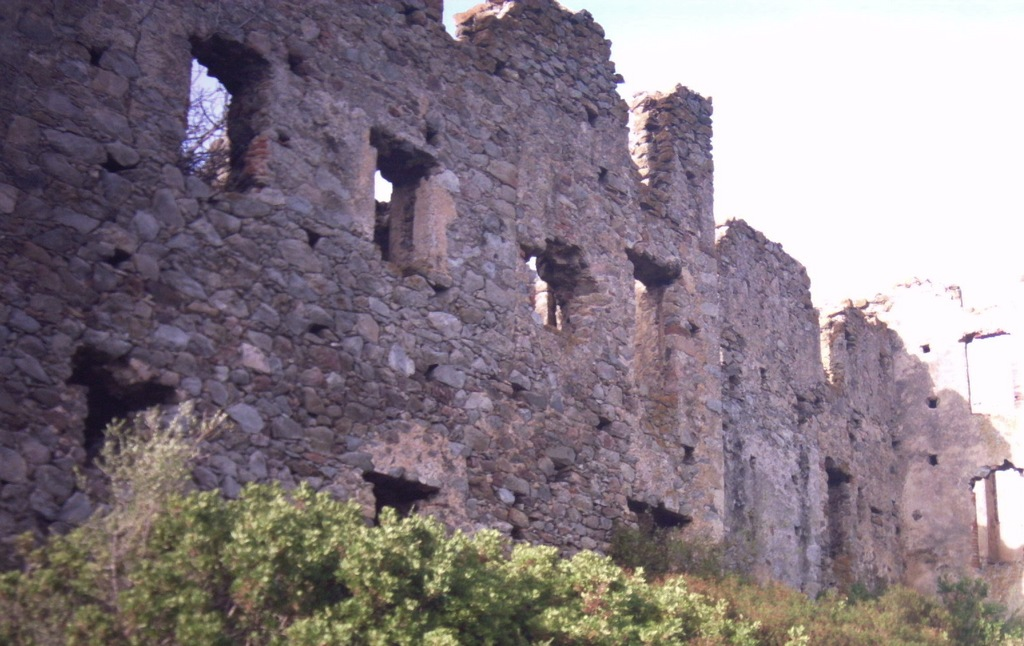 Les ruines du château de Coasina, en Haute-Corse (vue partielle)